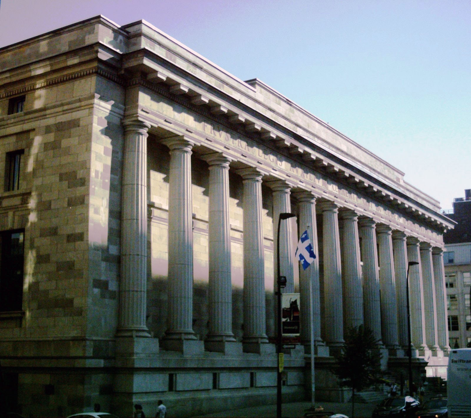 Édifice Ernest-Cormier, au 100 rue Notre-Dame Est à Montréal. Il abrite aujourd'hui la cour d'appel du Québec. Il fut construit en 1925. De 1925 à 1970, il était le palais de justice où l'on traitait les affaires criminelles. Sur l'architrave est écrit : « FRVSTRA LEGIS AVXILIVM QVAERIT QVI IN LEGEM COMMITTIT » (Celui qui enfreint la loi cherche son aide en vain).